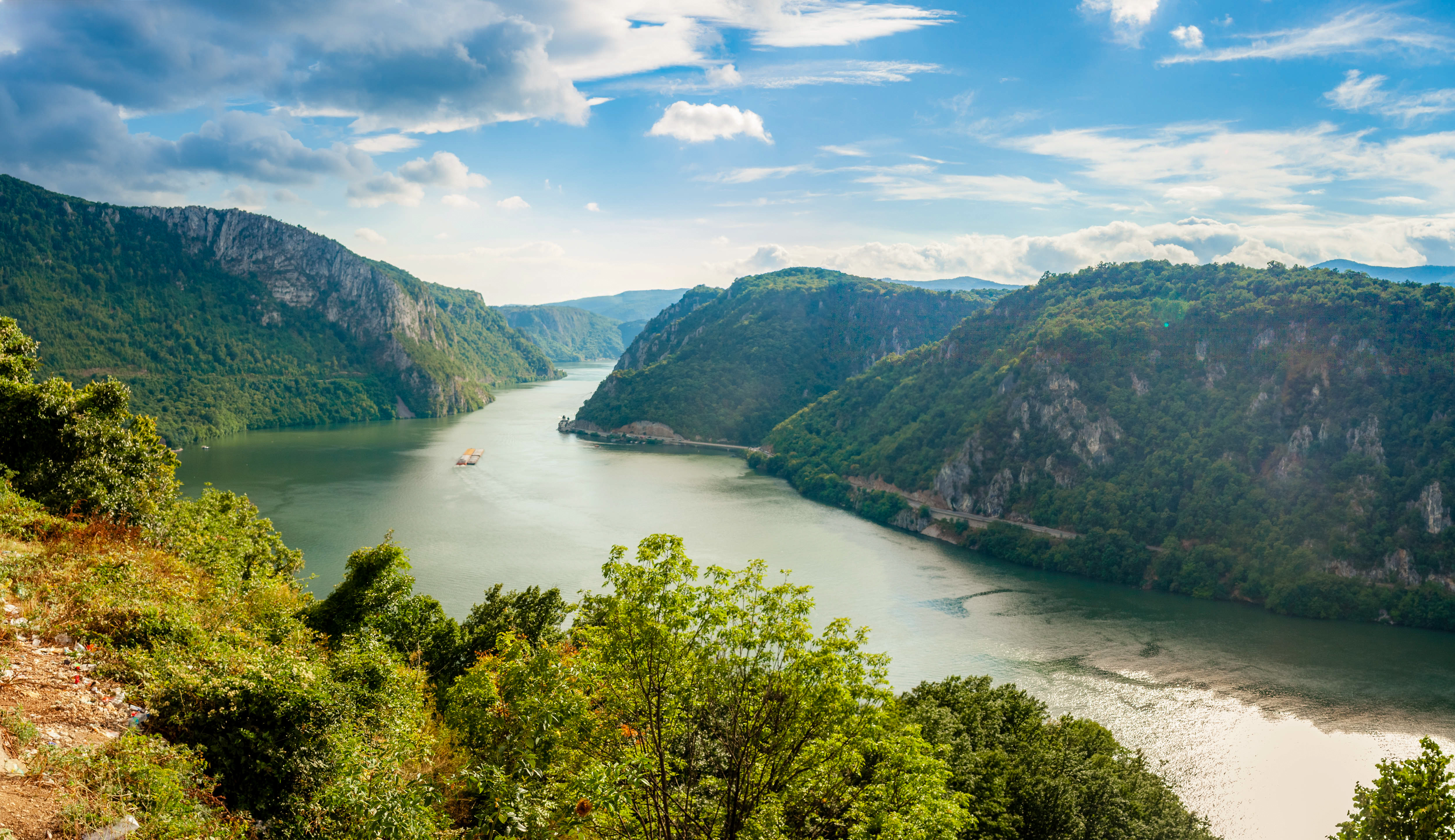 Srpski (latinica): Ово је фотографија заштићеног природног добра у Србији под шифром: НП04 This is a a photo of a natural area in Serbia with ID: НП04 Kazan, mesto gde je Dunav najuži, Nacionalni park Djerdap